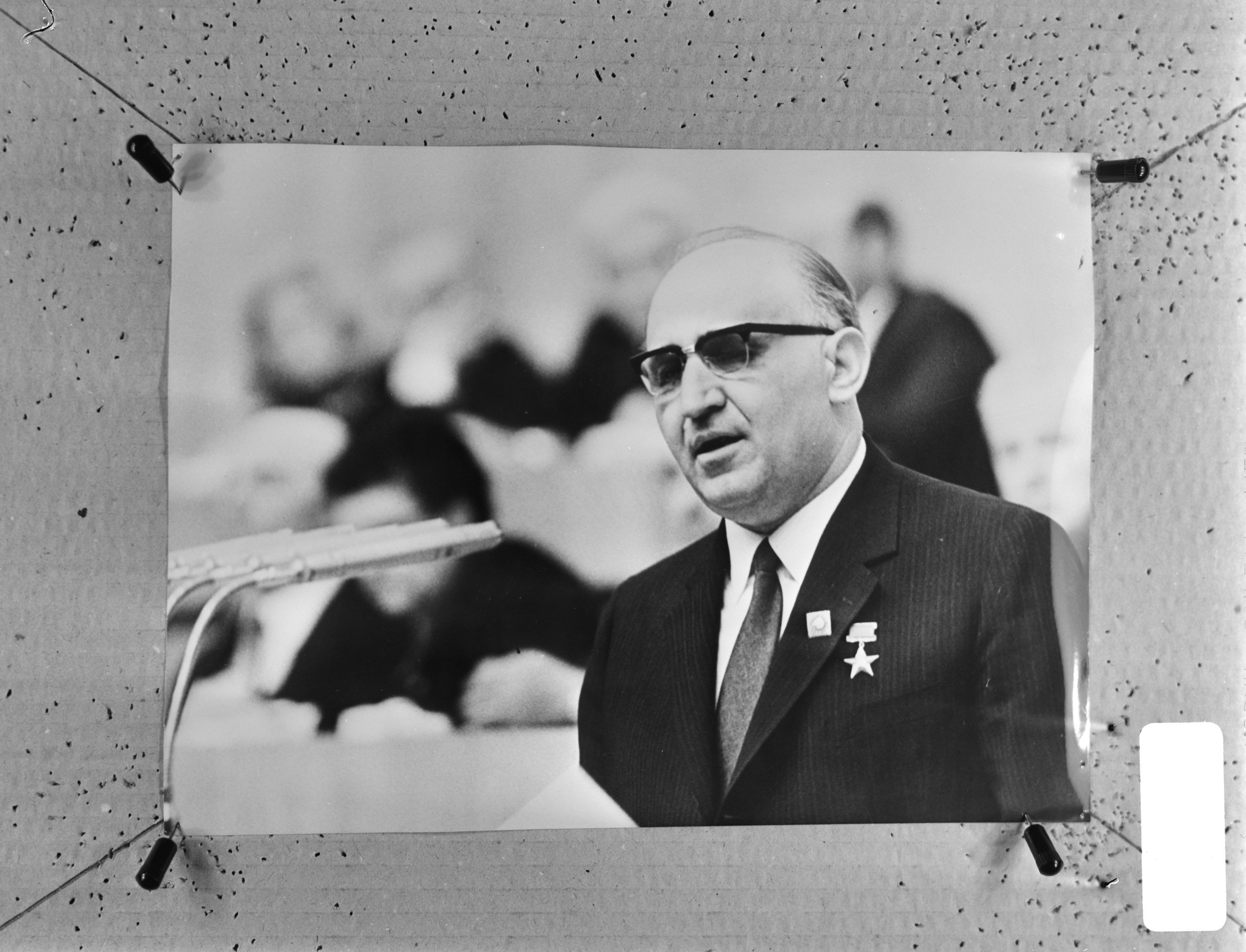 Collectie / Archief : Fotocollectie Anefo Reportage / Serie : [ onbekend ] Beschrijving : Todor Zhivkov , eerste secretaris Communistische Partij en president van Bulgarije tijdens congres Communistische Partij , april 1971 Datum : 10 augustus 1971 Locatie : Bulgarije Trefwoorden : congressen, presidenten, secretarissen Persoonsnaam : Communistische Partij Fotograaf : Fotograaf Onbekend / Anefo Auteursrechthebbende : Nationaal Archief Materiaalsoort : Negatief (zwart/wit) Nummer archiefinventaris : bekijk toegang 2.24.01.04 Bestanddeelnummer : 924-8077